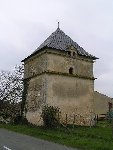 Pigeonnier de Bernegoue, à Damvix, en Vendée.